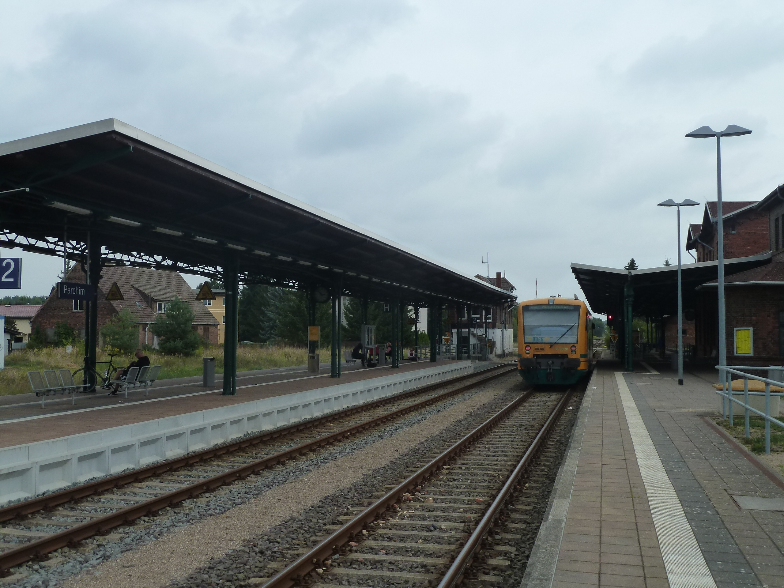 Bahnhof Parchim, Bahnsteige